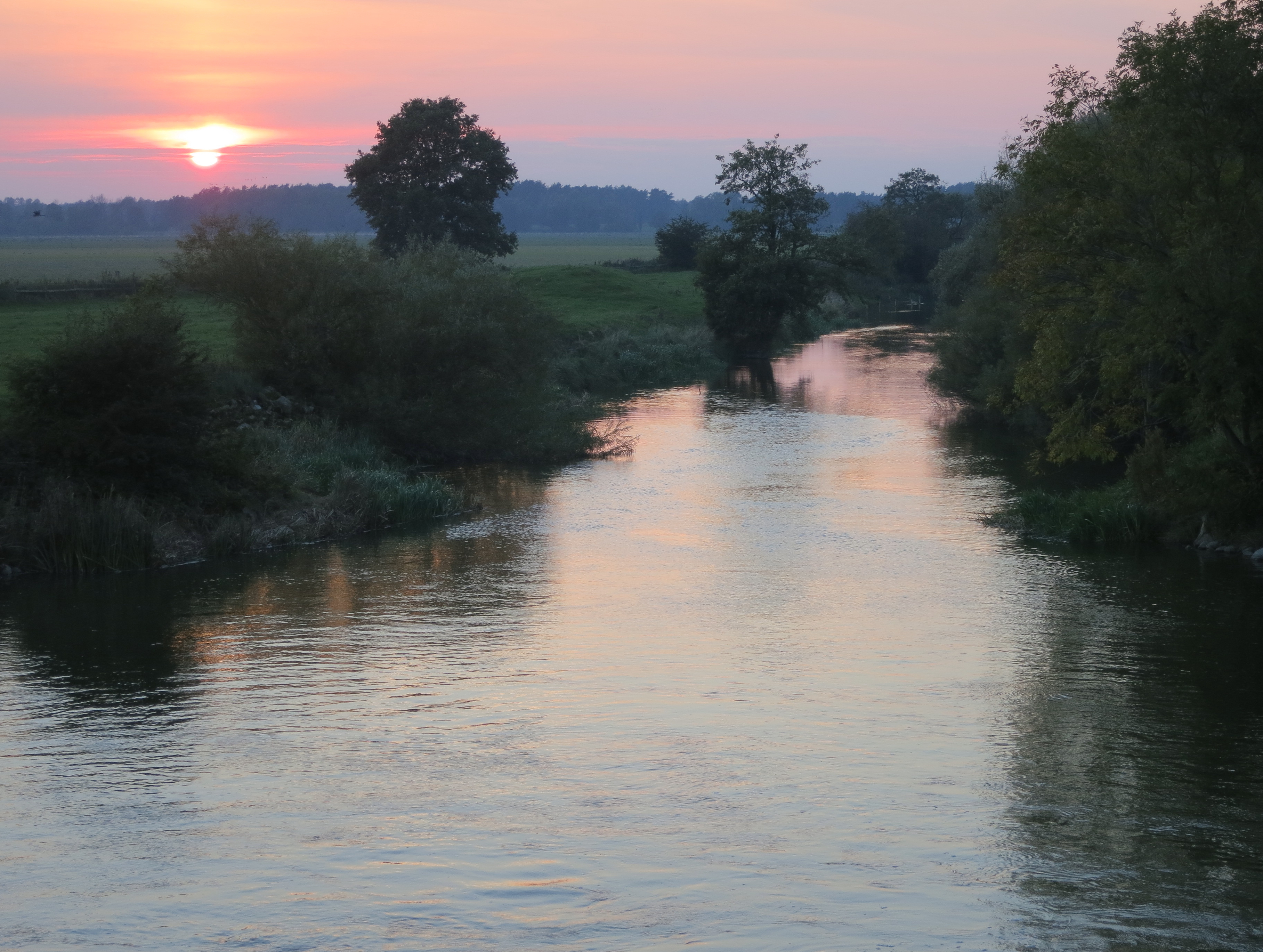 Kävlingeån vid Vombsjön